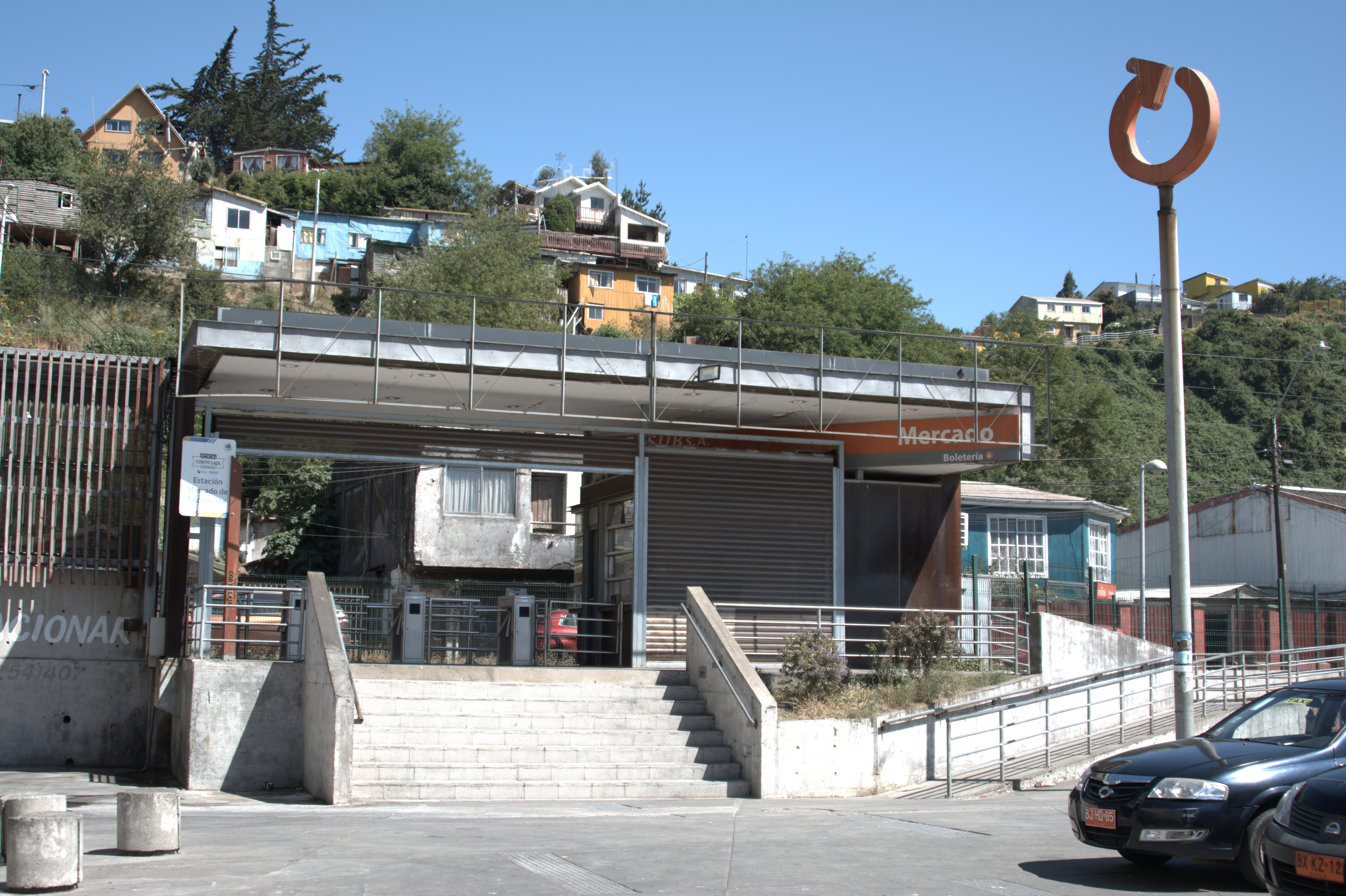 Estación Mercado, Biotrén. Concepción, diciembre de 2019